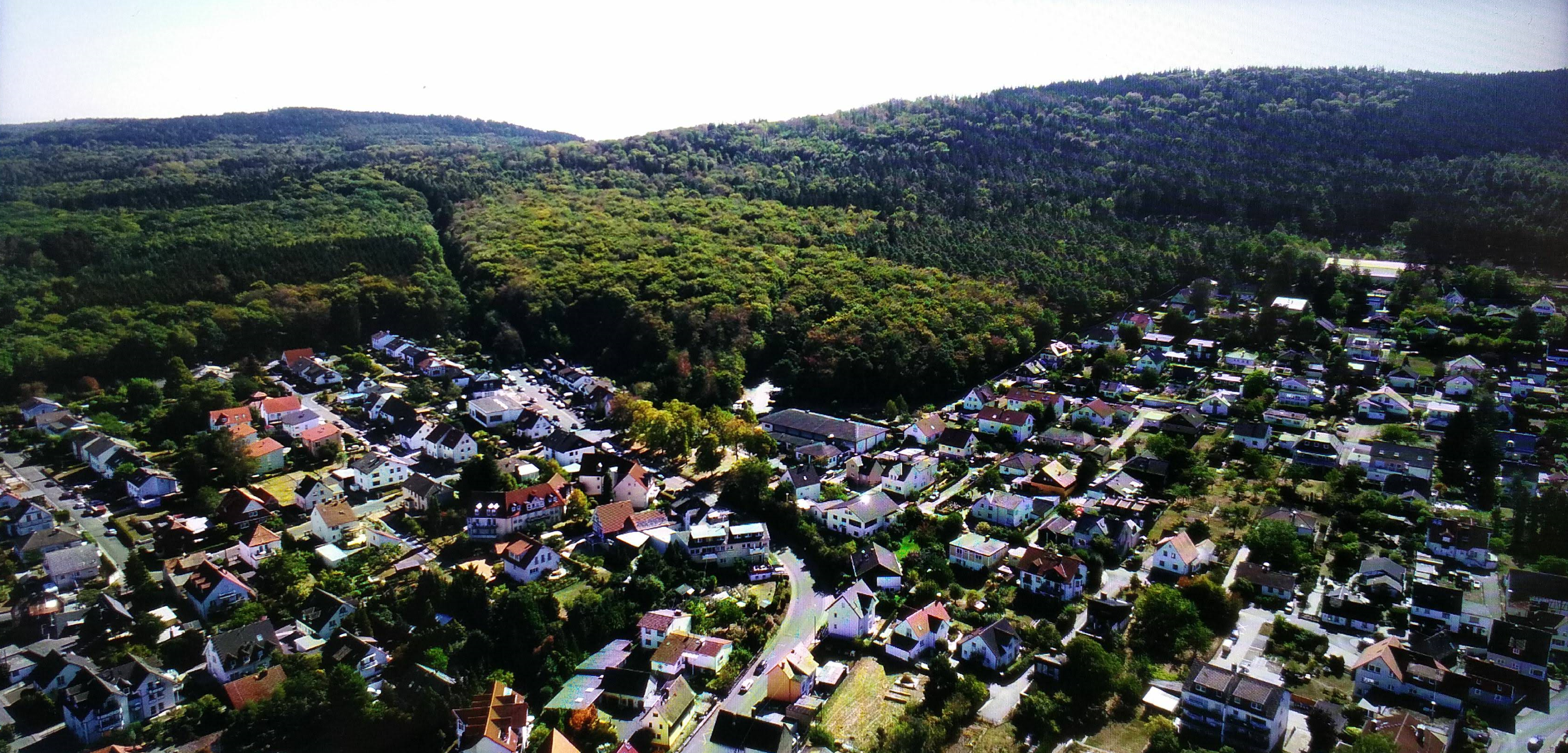 Obernhain aus der Luft (Blick Richtung Westen)